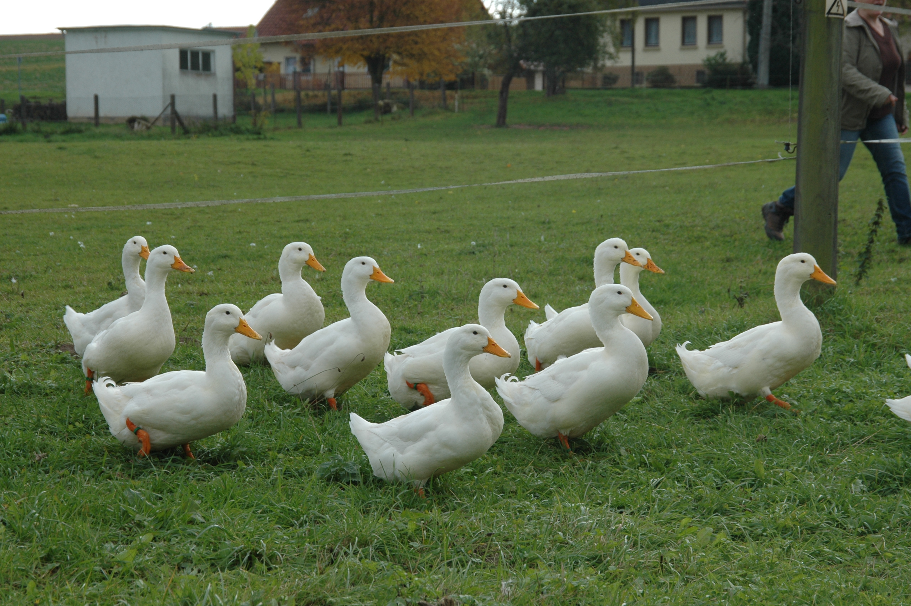 Amerikanische Pekingenten